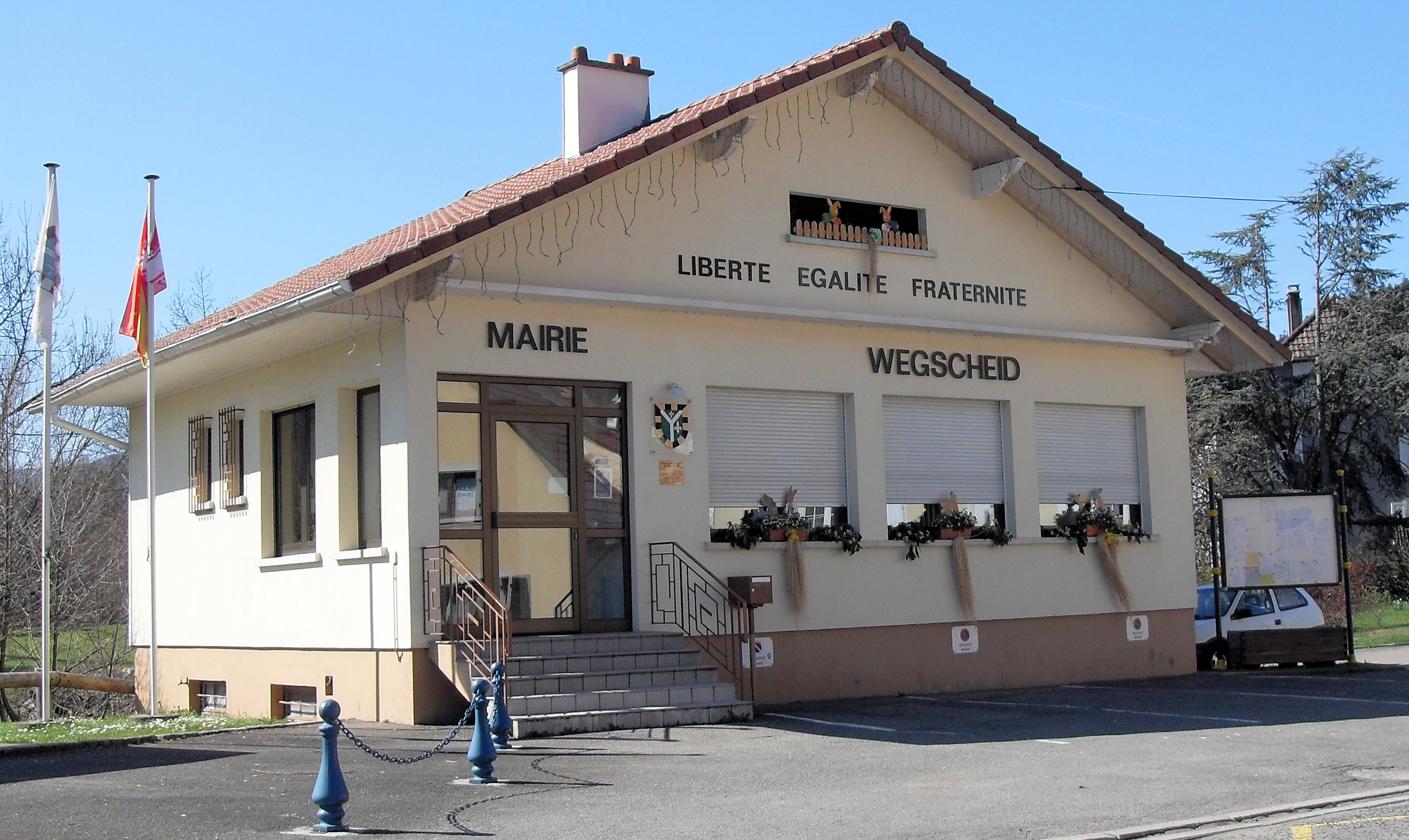 La mairie de Wegscheid